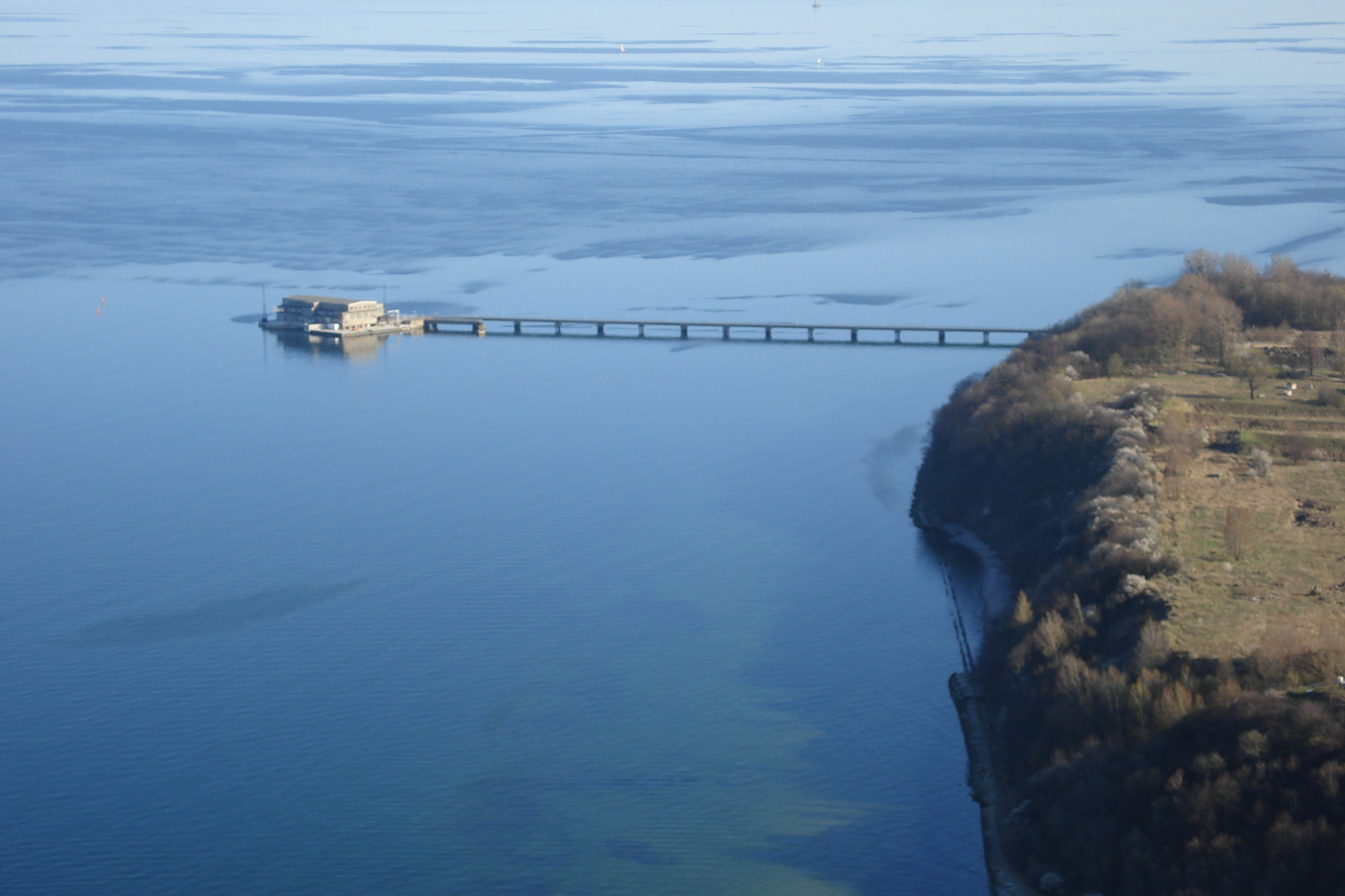 Gdynia z "lotu ptaka"